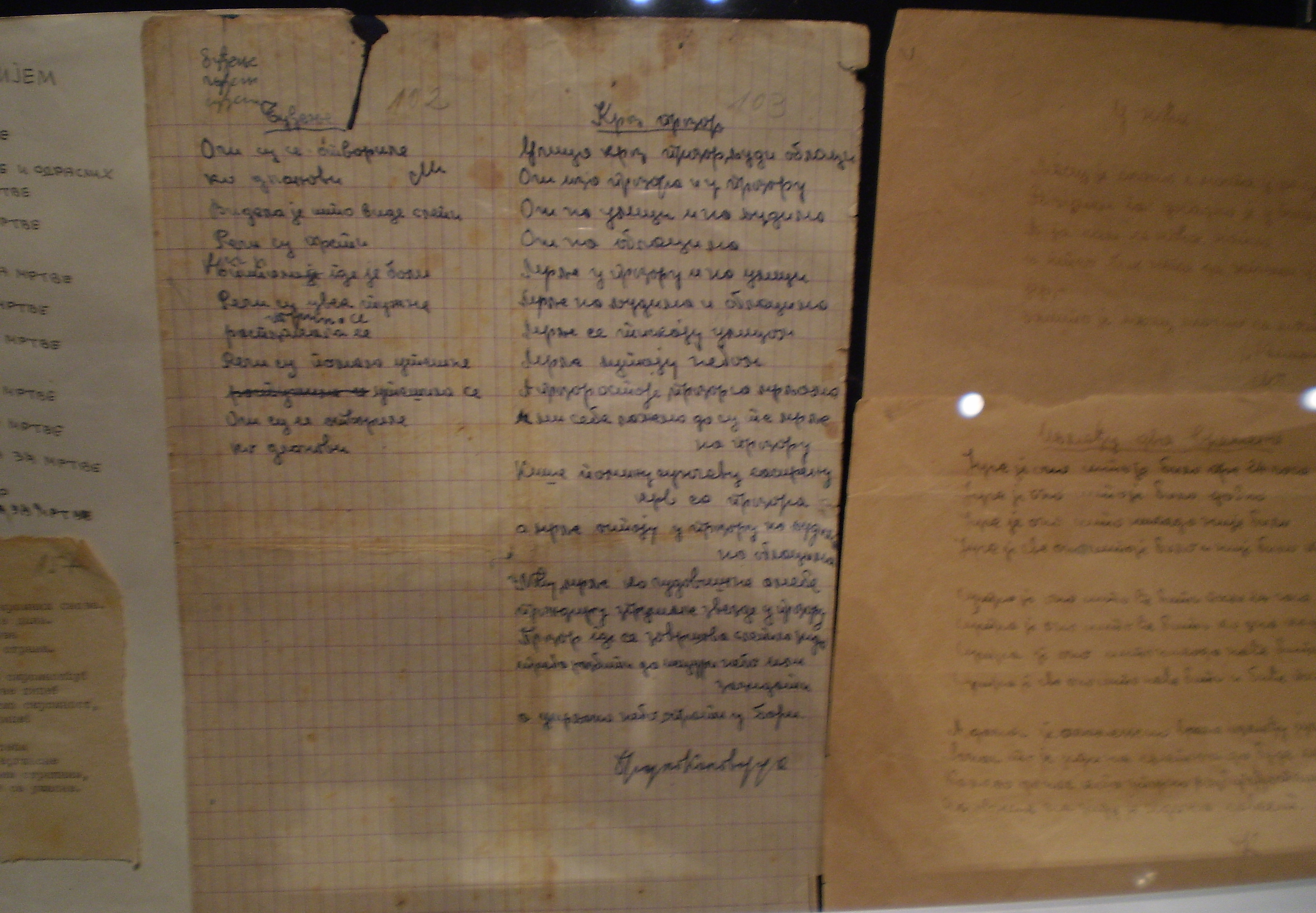 Branko_Miljkovic_rukopisi Autor dr Milorad Dimic, Nis, 29. septembar 2011